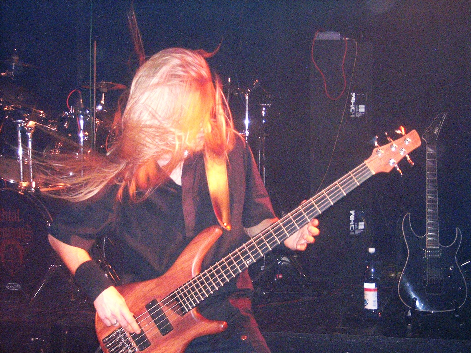 Pawel "Firana" Krajnik member of Trauma - polish death metal band